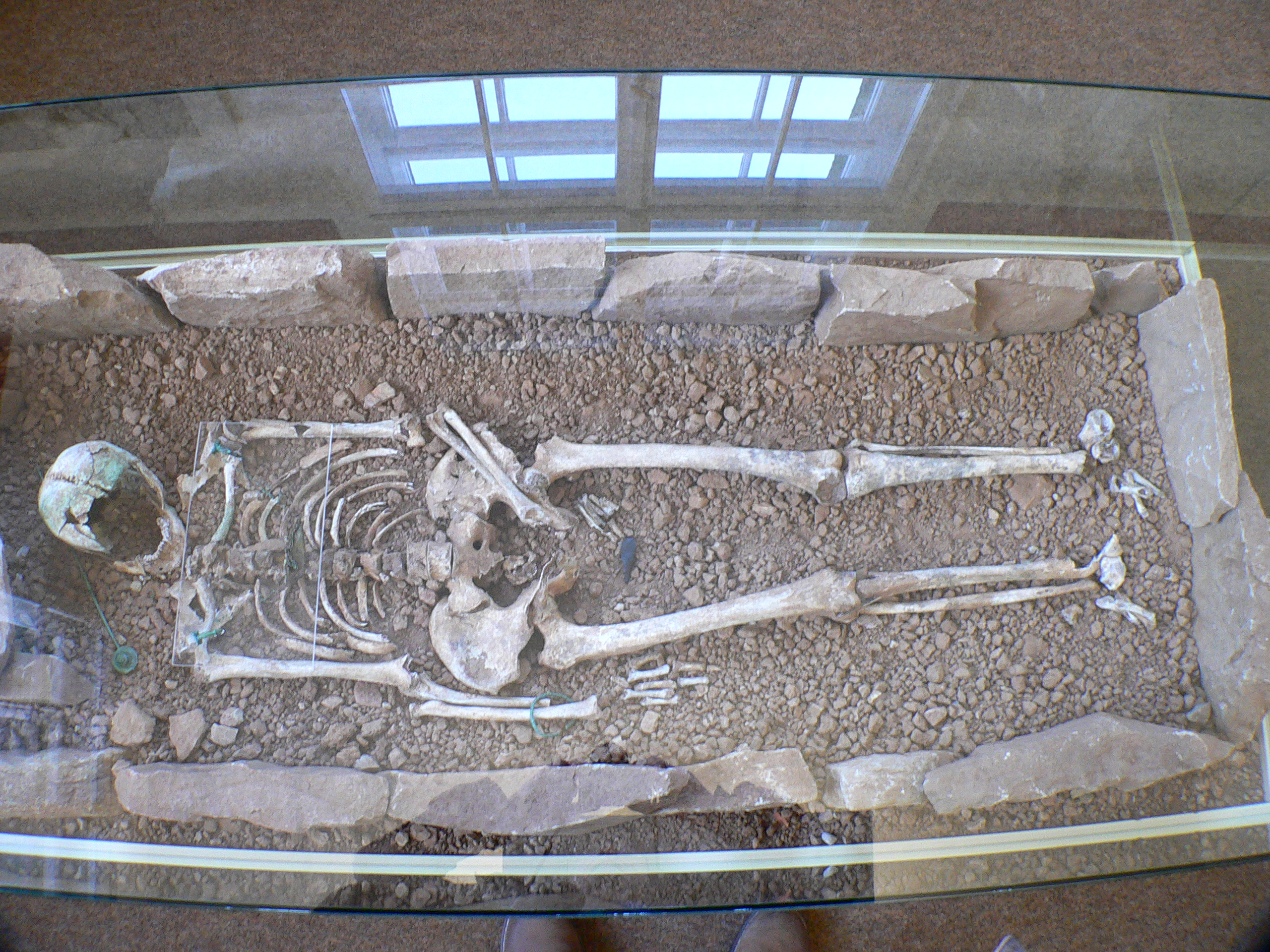 Körperflachgrab aus der Latènezeit im Steinsburgmuseum in Römhild (Ortsteil Waldhaus) - Thüringen, Deutschland